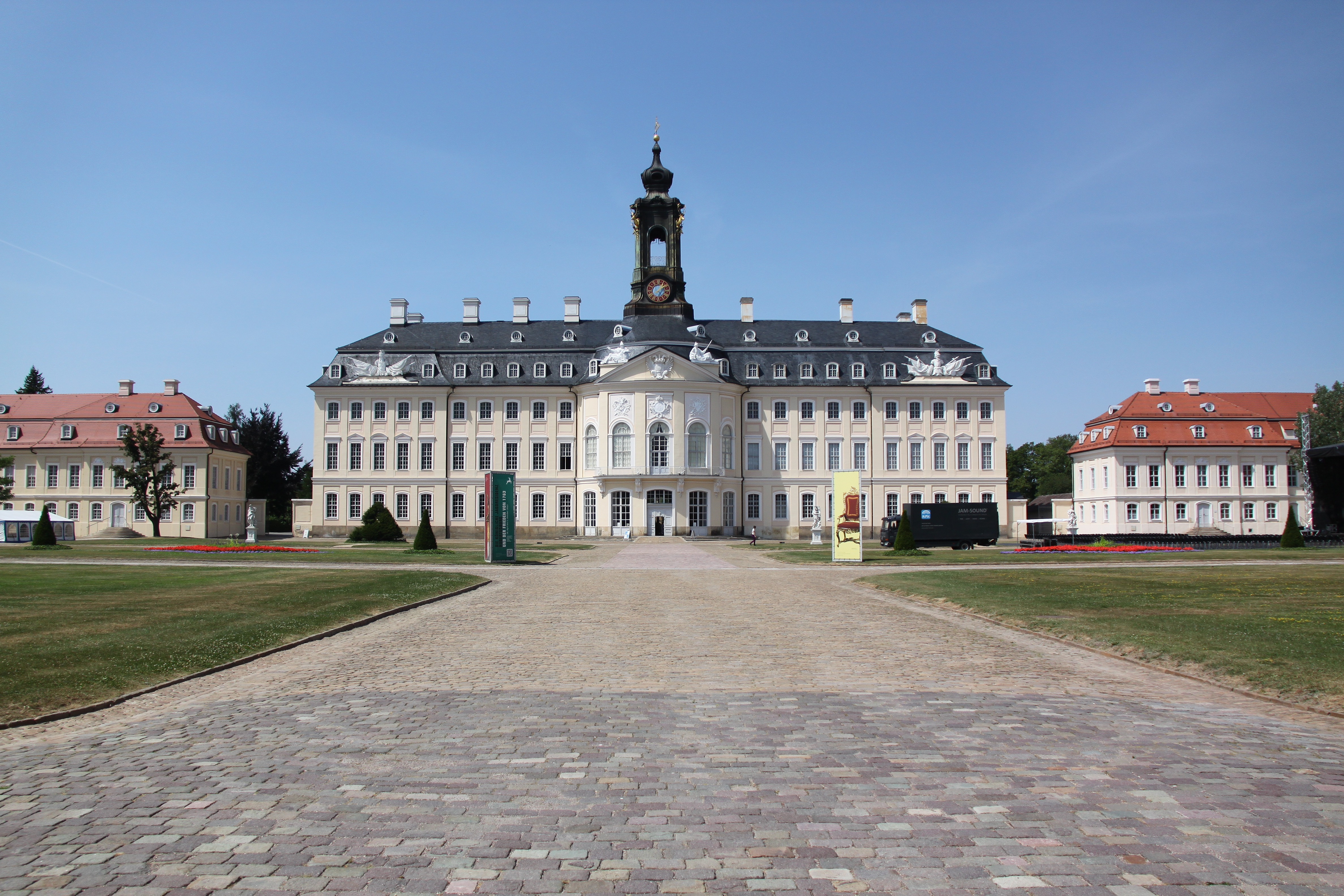 Château Hubertusburg, Wermsdorf, Sachsen, Deutschland